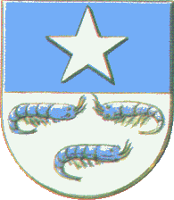 Wapen van Gemeente in voormailig Ned. Indië